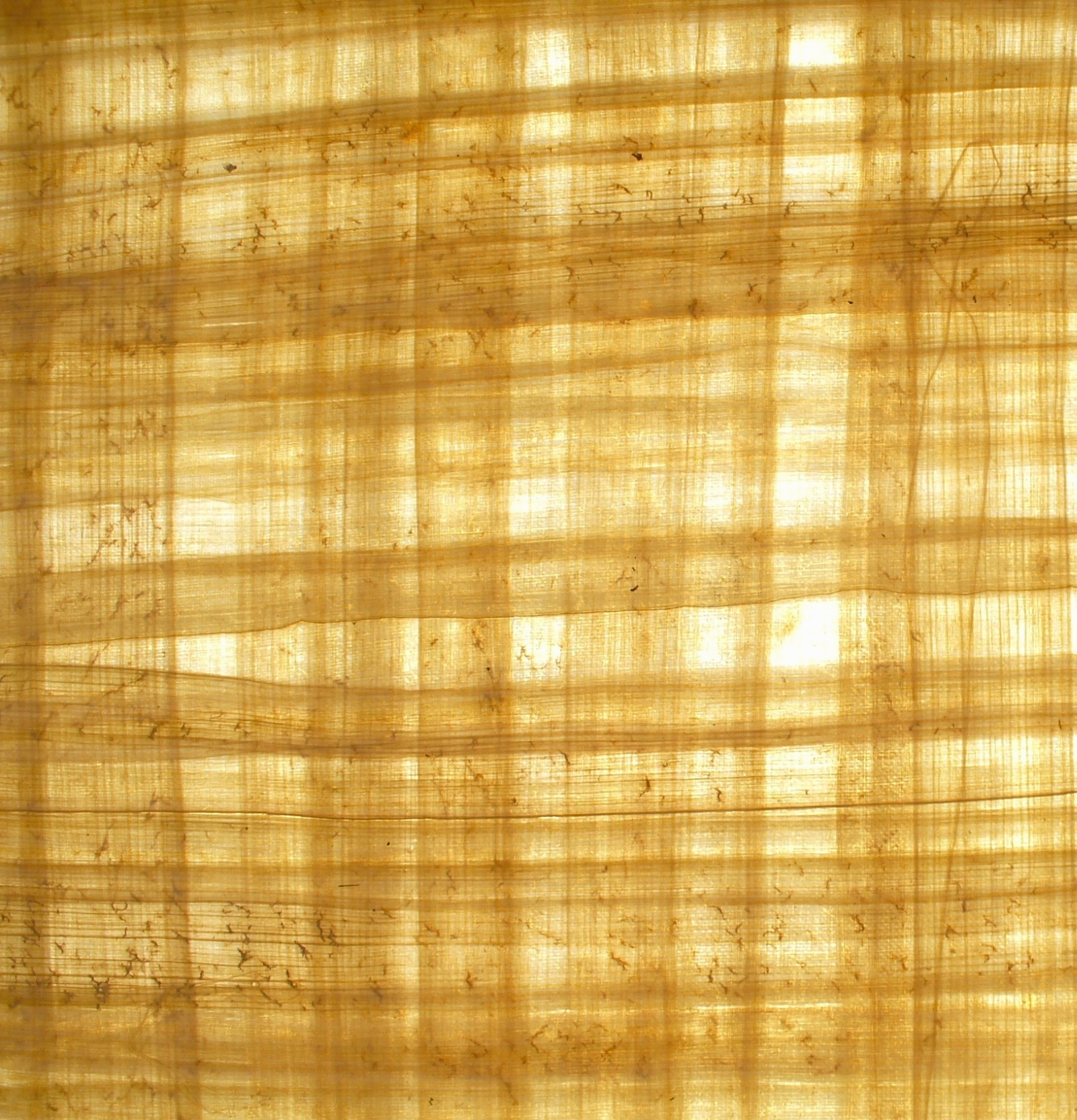 blank papyrus paper, Cairo, Egypt